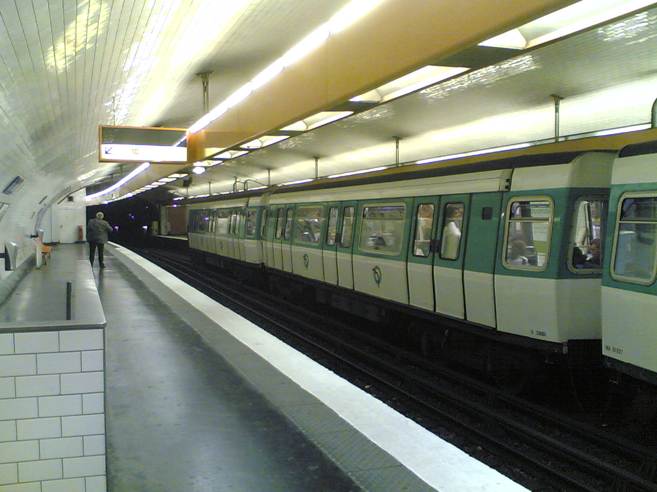 Quais de la station Jussieu ligne 7 du métro de Paris